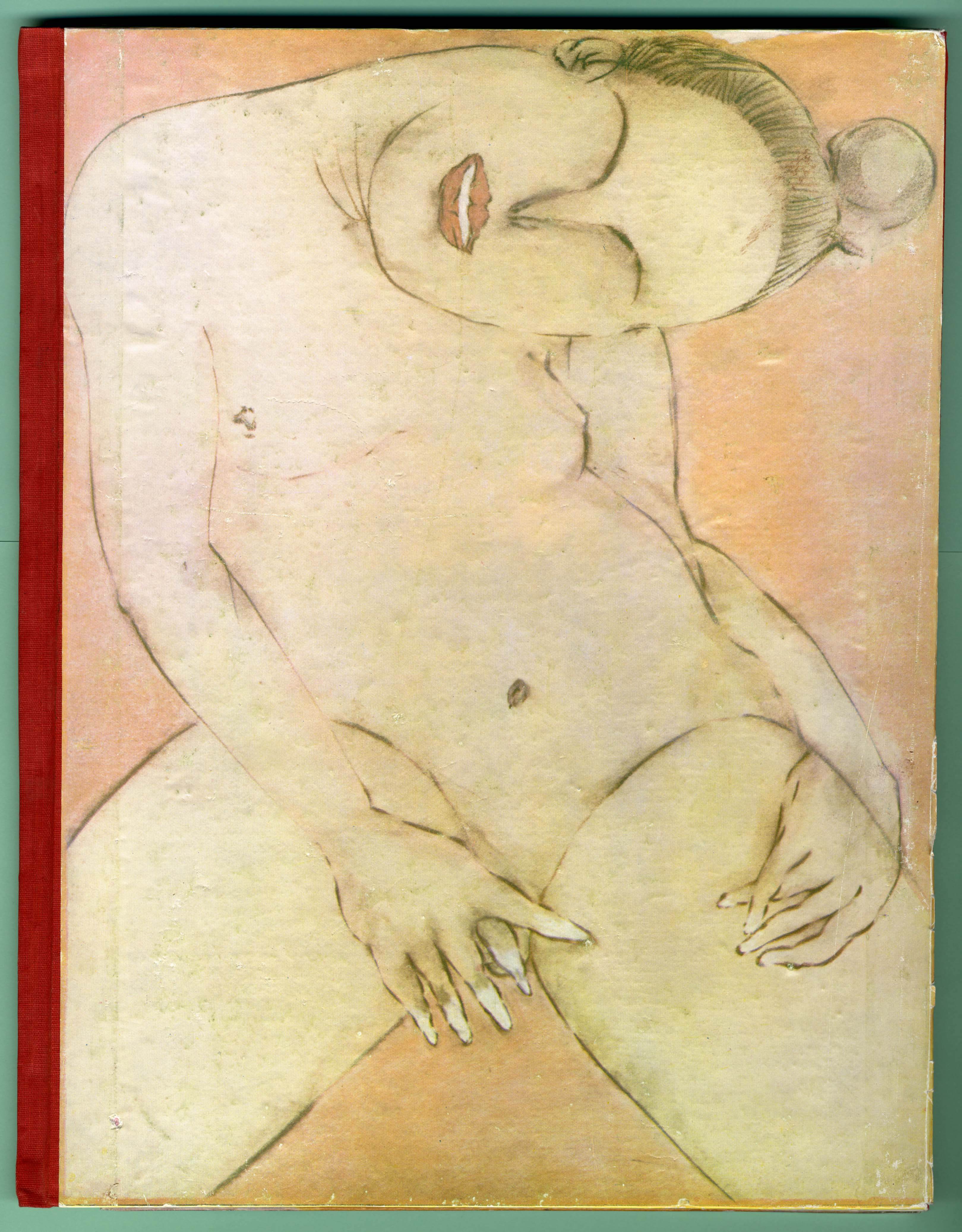 Kunstenaarsboek. Francesco Clemente. Uitgever: [London : Anthony d'Offay Gallery, 1981]. - [18] p. : ill. ; 34x27 cm. - Met ingevoegde kleurplaten en gouaches op zwaar handgeschept papier. - Gesigneerd. Zie ook: AB00026; AB00467 en AB00519. Collectie Gelderland.